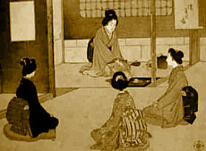 「茶の湯日々草」より 『濃茶の図』、木版画